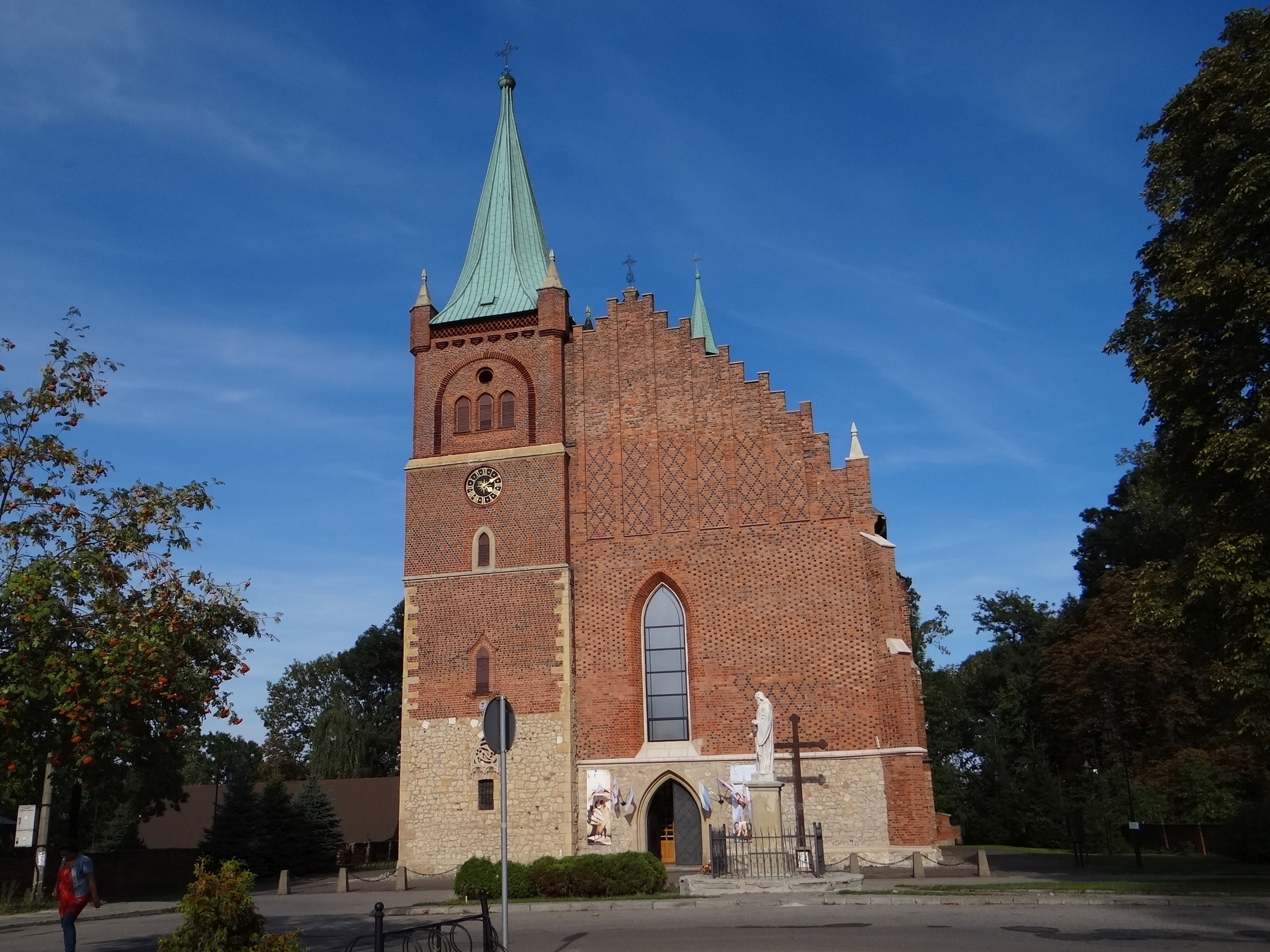 Kościół w Zatorze